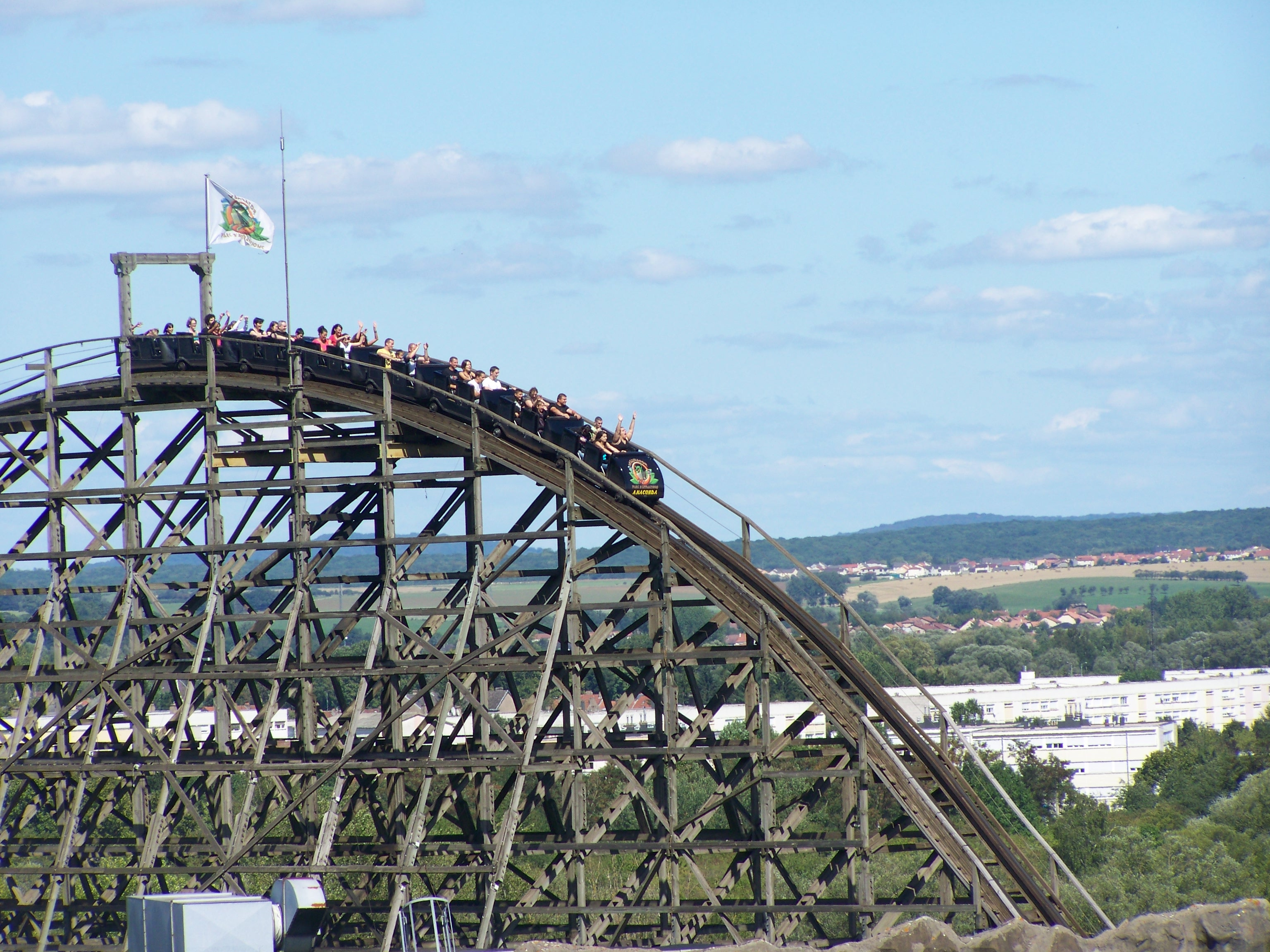 Anaconda - Wonder Coaster Walygator Parc